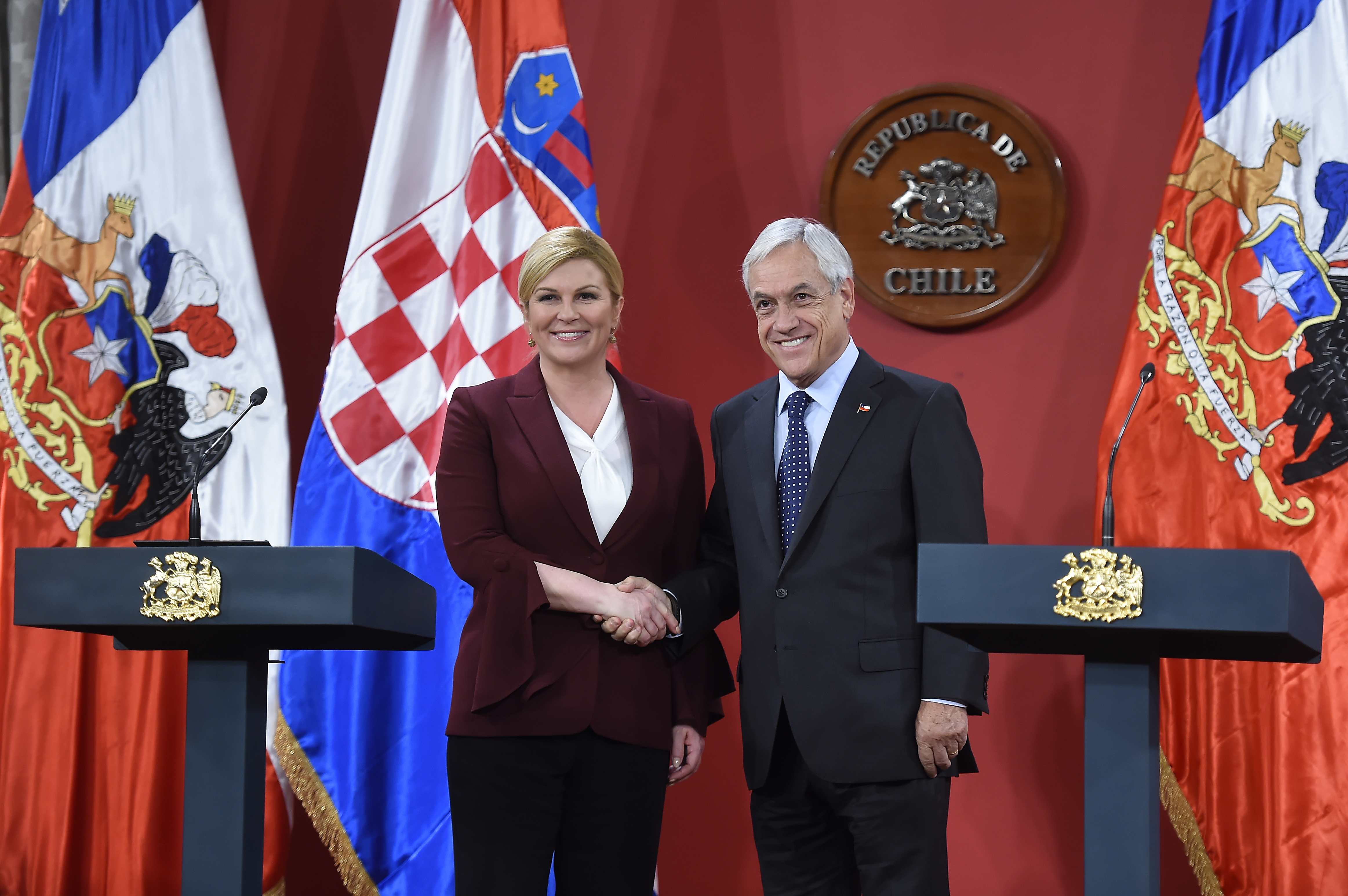 Firma de acuerdo cultural Chile-Croacia 2018-2021 y declaración a la prensa. A la izquierda se encuentra la Preisdenta de Croacia Kolinda Grabar-Kitarović firman y a su derecha el Presidente de Chile Sebastián Piñera Echenique Fotógrafo: Sebastián Rodríguez